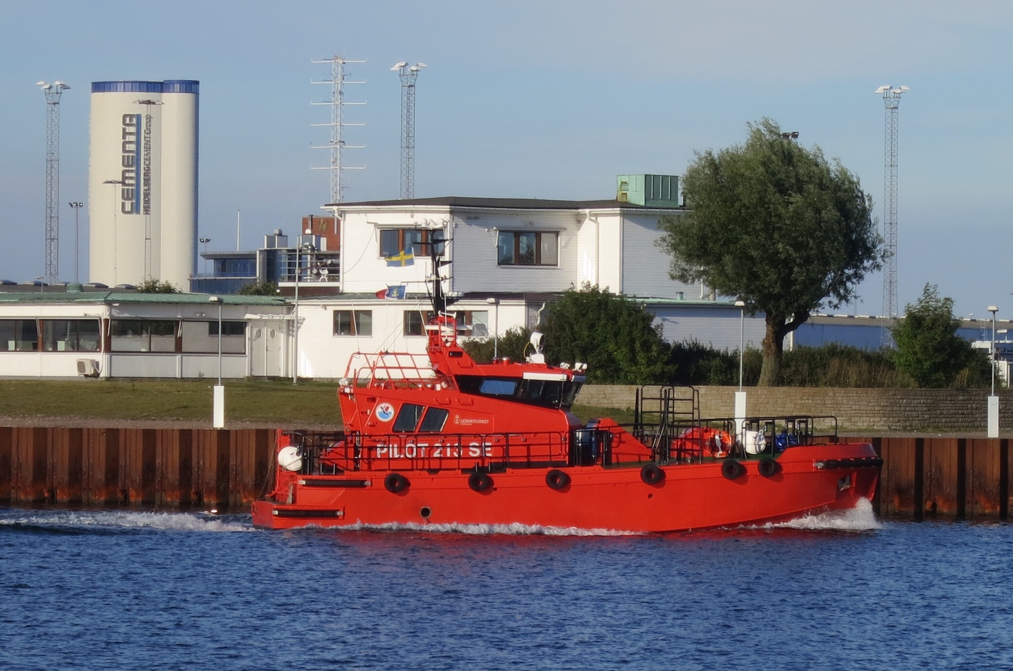 Pilot 213 SE i Malmö